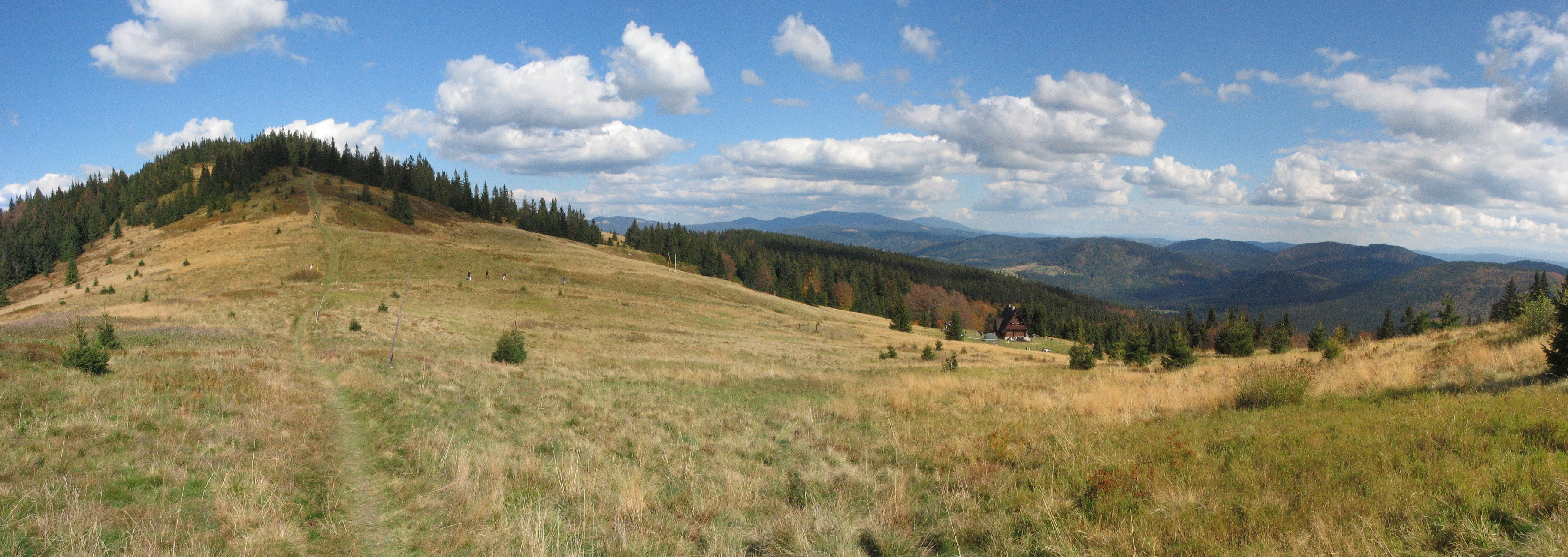 Hala Rycerzowa, Mała Rycerzowa, Bacówka na Rycerzowej oraz widok na Beskid Żywiecki (Grupę Romanki, Pilsko, Babią Górę). Zdjęcie ze szlaku na Wielką Rycerzową.